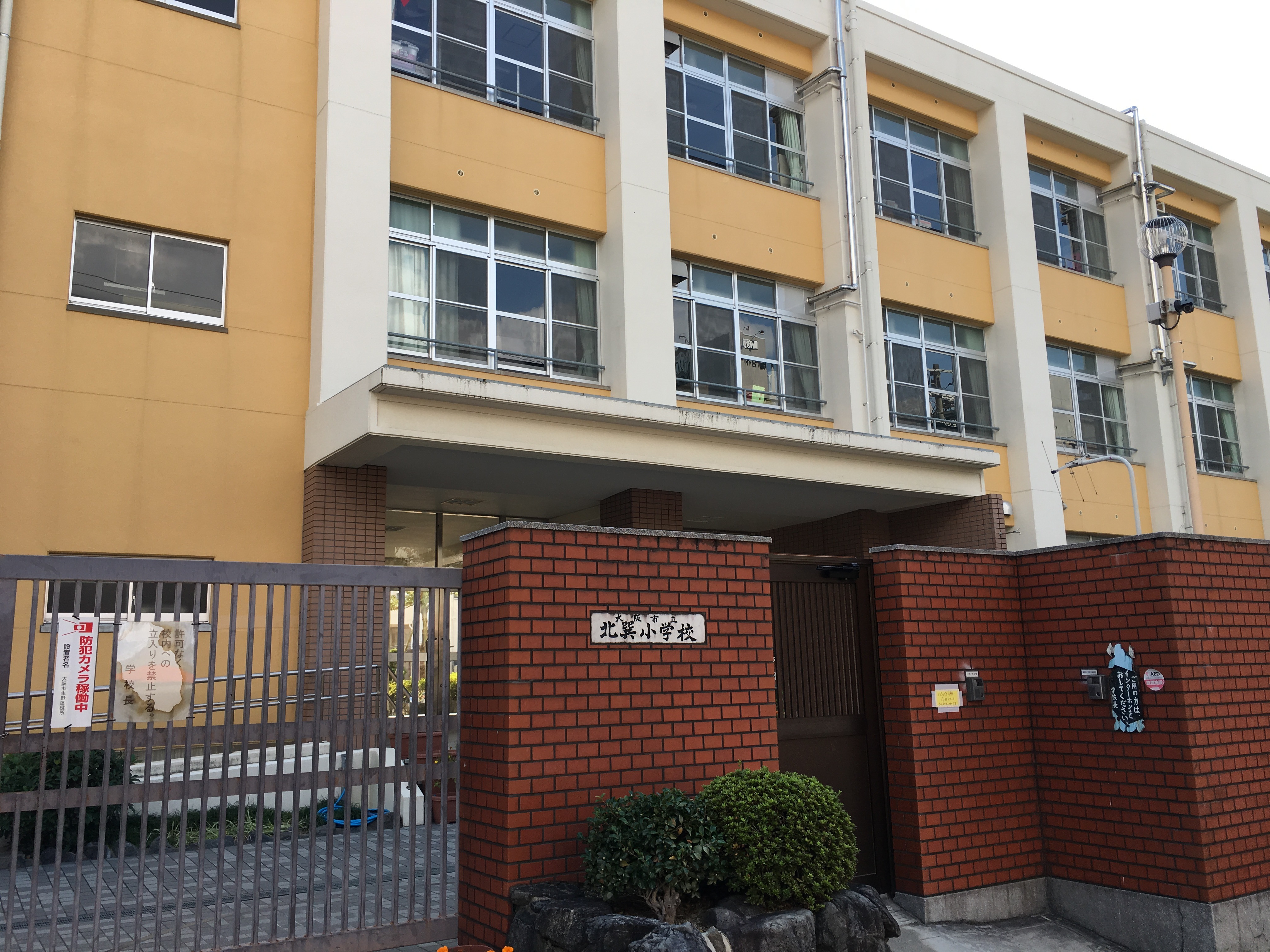 北巽小学校 正門